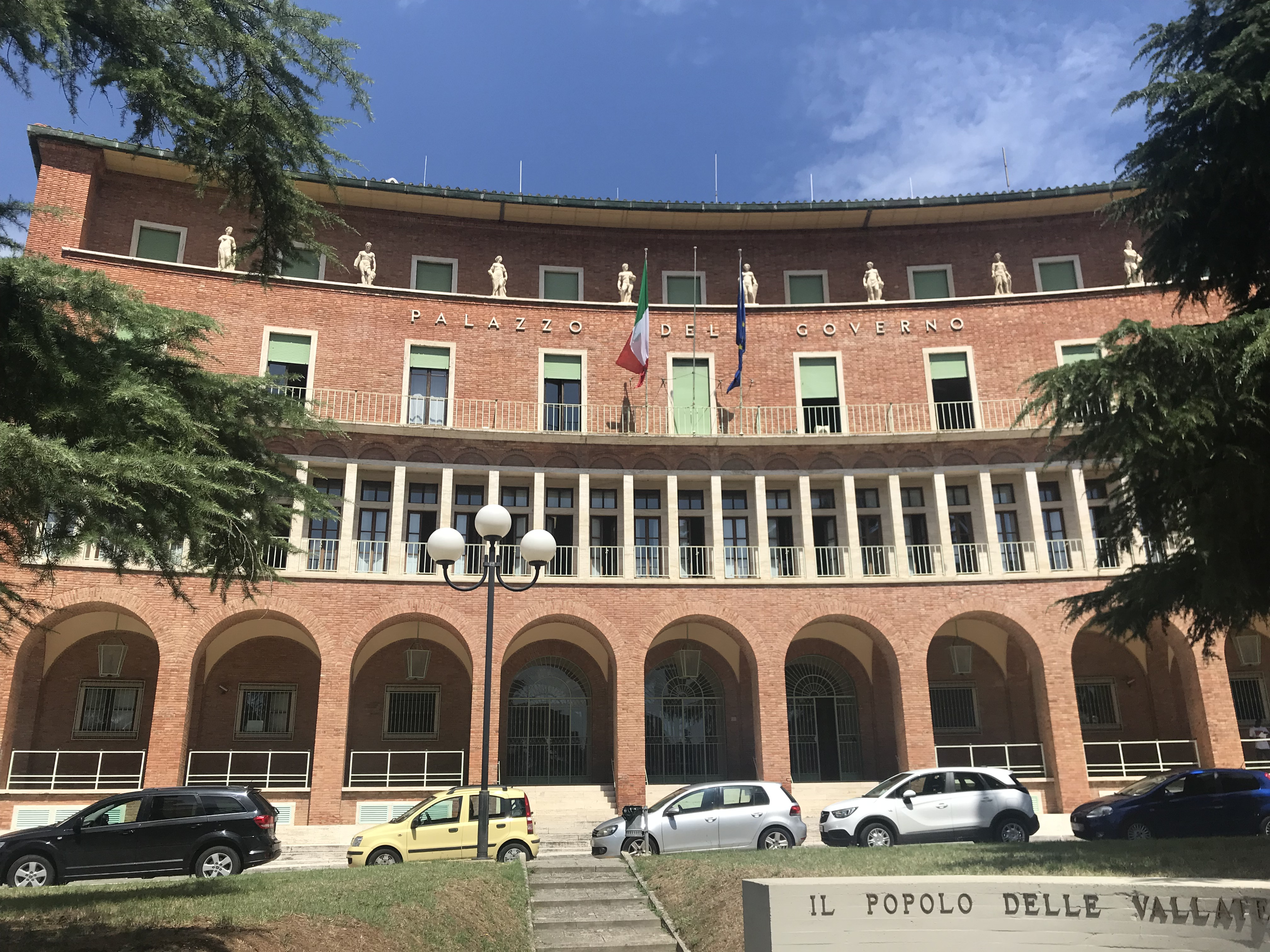 Palazzo del governo di Arezzo